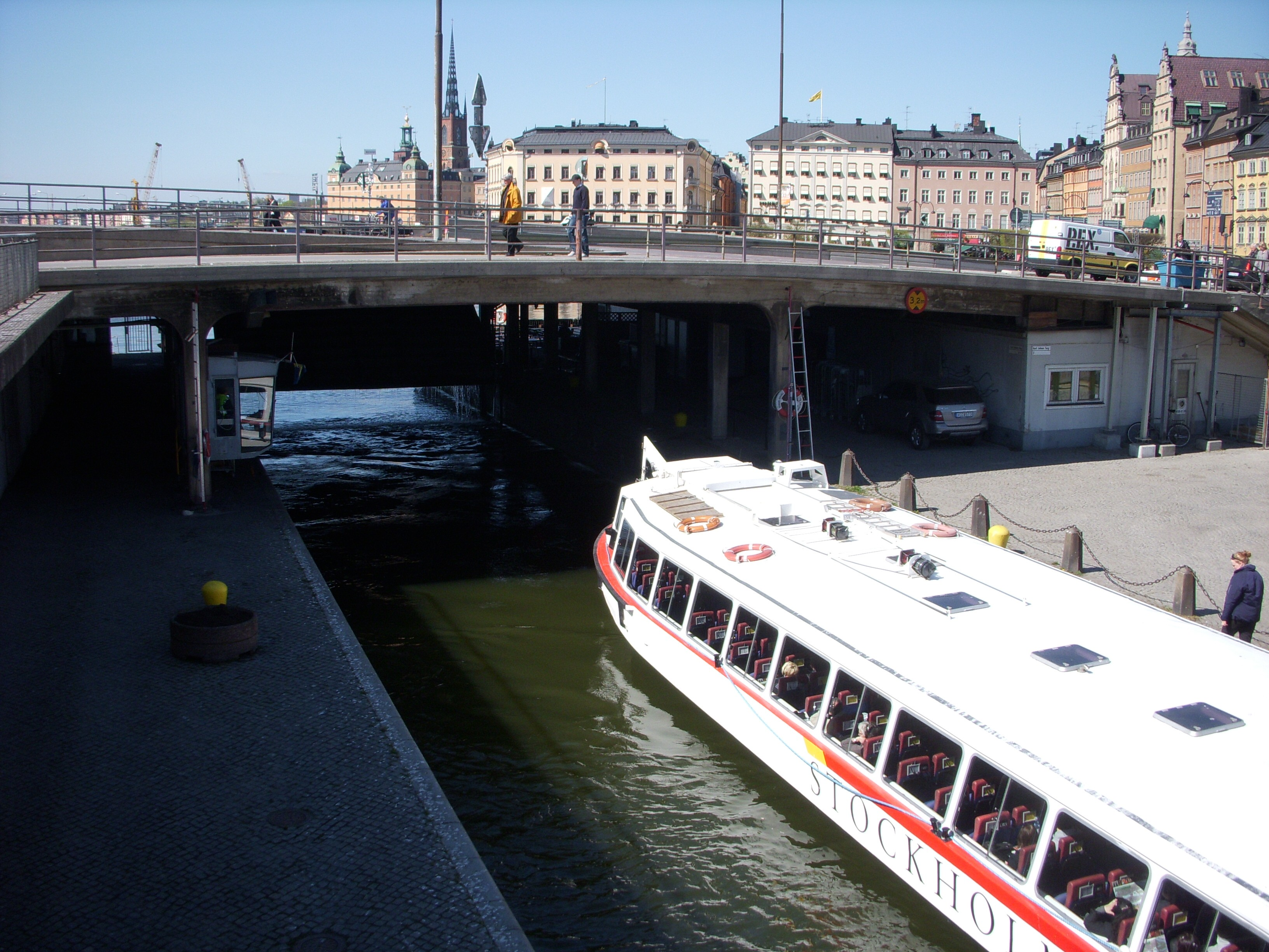 Sightseeingbåt i Slussen i Stockholm